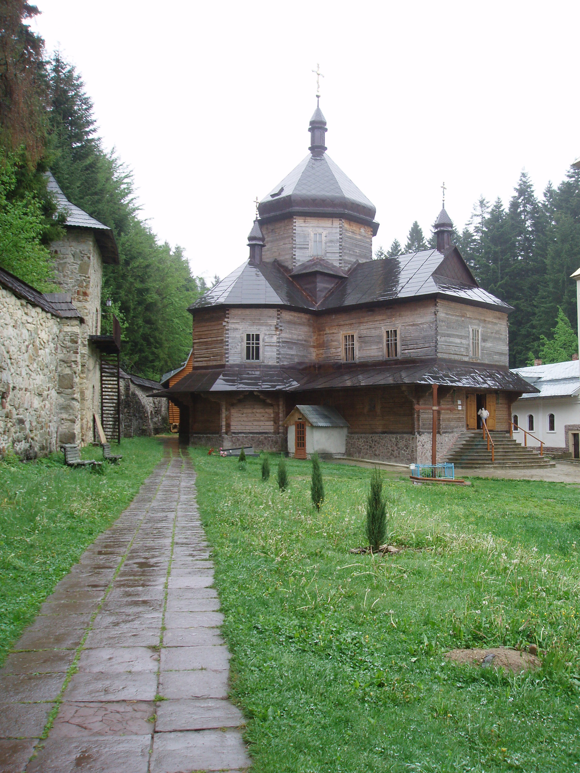 Фотографическое изображение внутреннего двора Манявского скита в Ивано-Франковской области